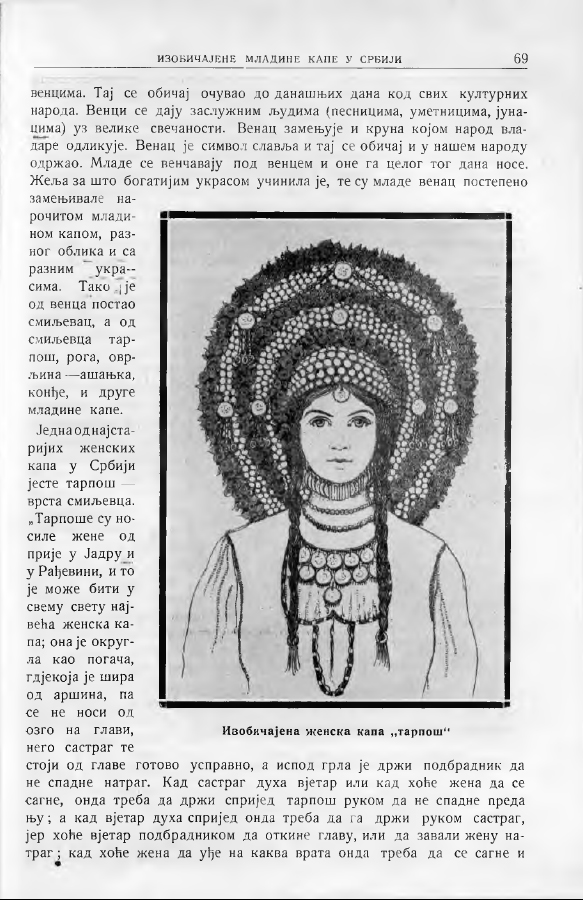 Strana iz Glasnika Etnografskog muzeja u Beogradu, knj. 1 (1926)